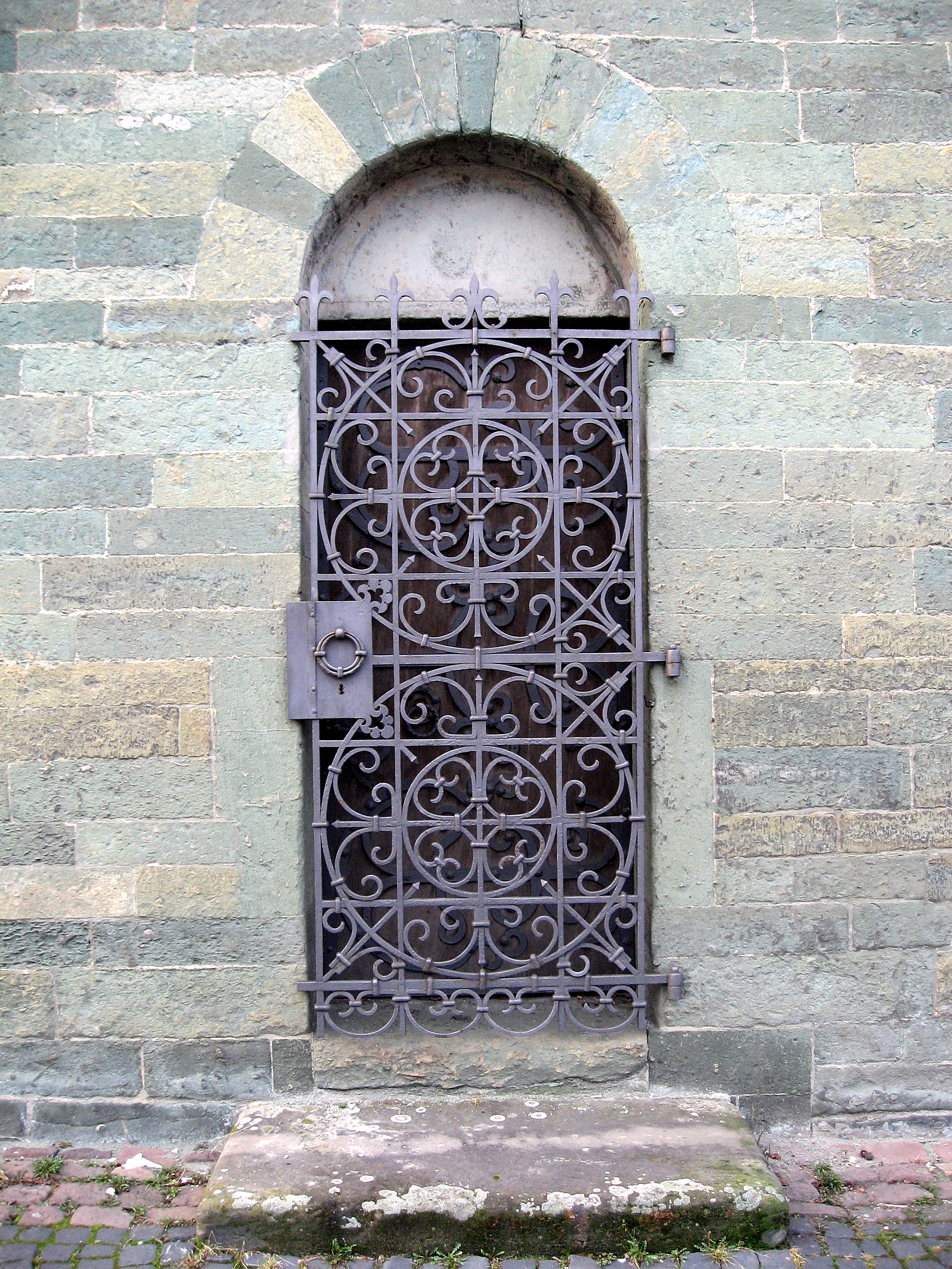 Soest, St.-Nikolai-Kapelle